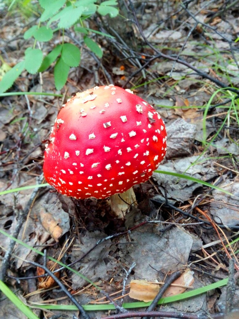 Amanita muscaria. Eastern Siberia